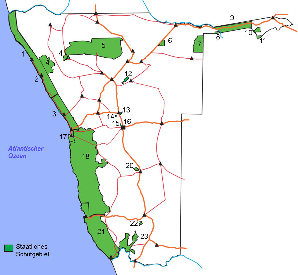 Karte der Nationalparks und Erholungsgebiete in Namibia